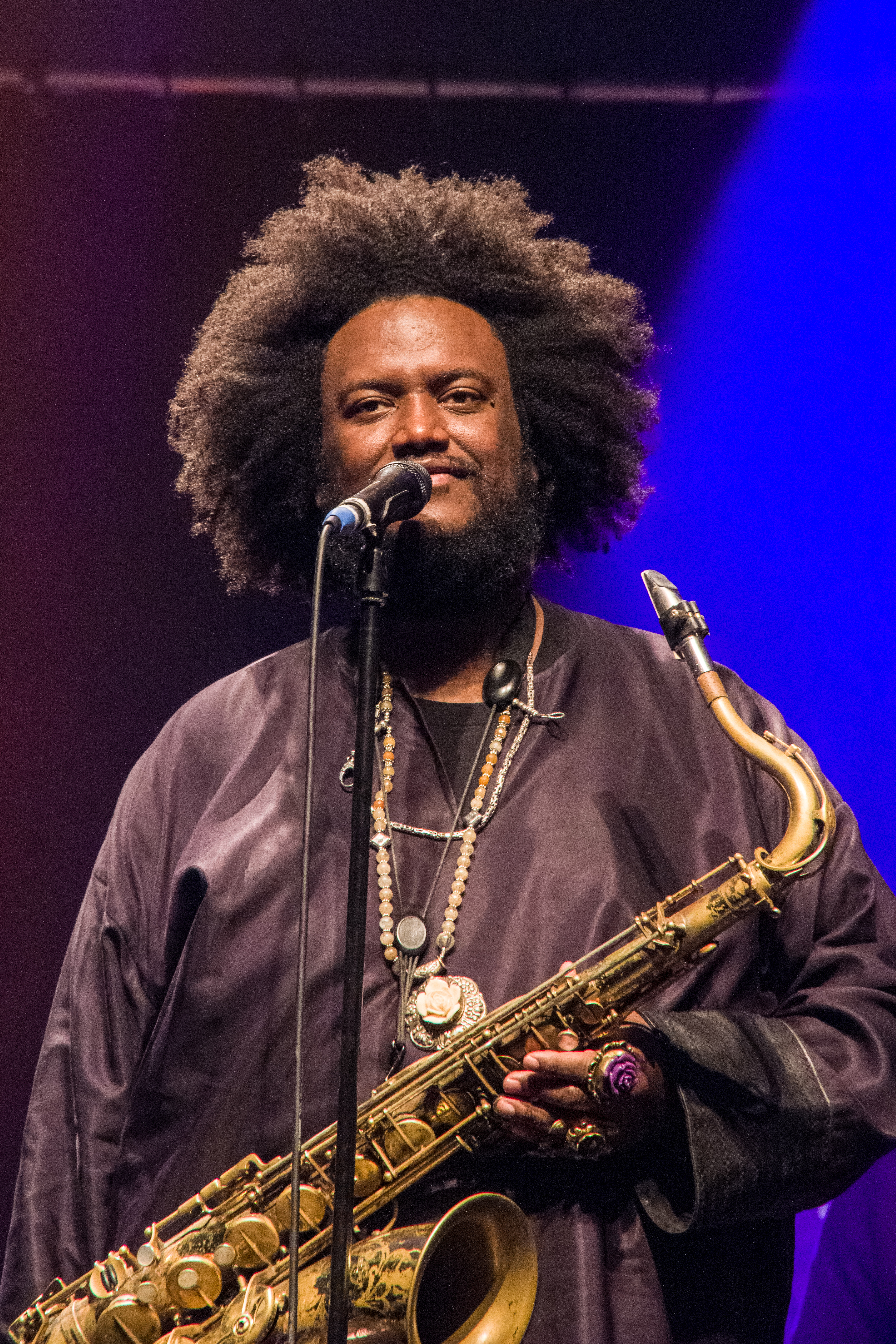 Das Zelt-Musik-Festival 2019 in Freiburg im Breisgau 15.07.2019 Kamasi Washington